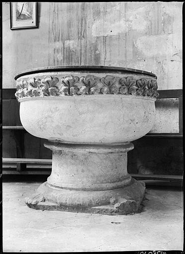 église Saint-Denis de Jouy le Comte